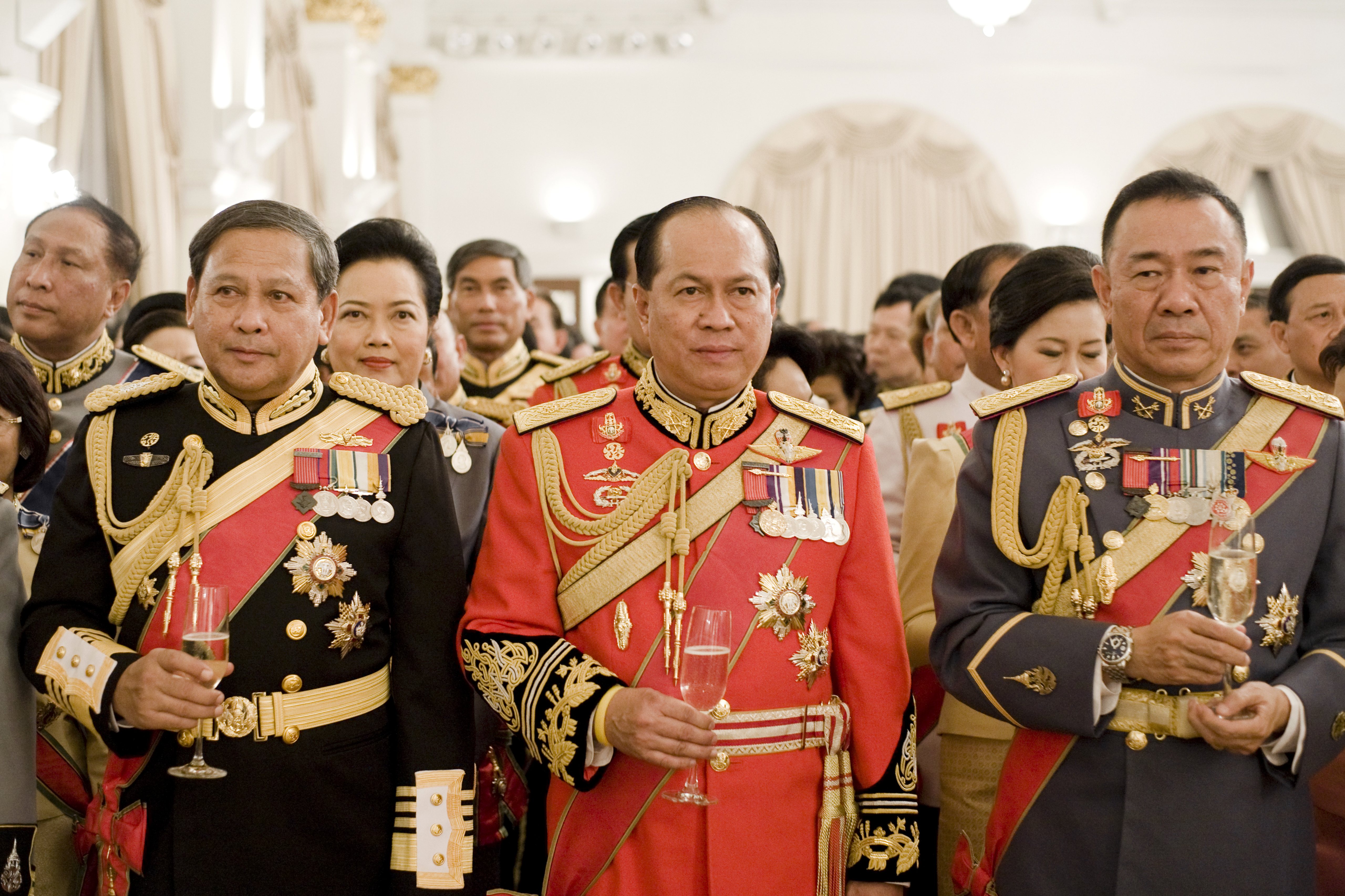 Royal Thai Navy Chief Admiral Kamthorn Phumhiran, Royal Thai Army Chief General Anupong Paojinda and Royal Thai Armed Forces Supreme Commander General Songkitti Chakkrabat พลเรือเอกกำธร พุ่มหิรัญ / พลเอกอนุพงษ์ เผ่าจินดา / พลเอกทรงกิตติ จักกาบาตร์ นายกรัฐมนตรีเป็นเจ้าภาพจัดงานสโมสรสันนิบาตเฉลิมพระเกียรติพระบาทสมเด็จพระ เจ้าอยู่หัวเนื่องวันฉัตรมงคล วันที่ 5 พฤษภาคม 2553 ในนามรัฐบาล ณ ตึกสันติไมตรี ทำเนียบรัฐบาล (The Official Site of The Prime Minister of Thailand Photo by พีรพัฒน์ วิมลรังครัตน์)